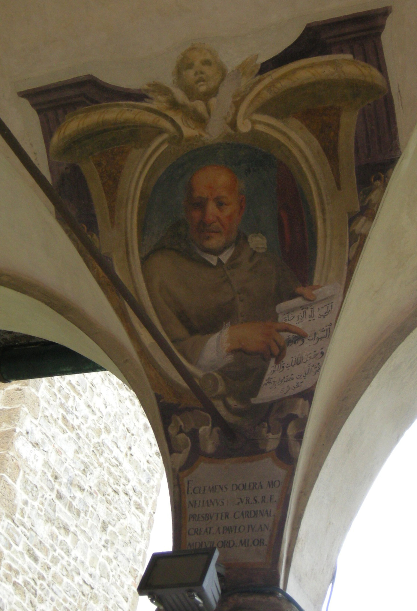 Chiostro di ognissanti, personalità francescane 46 Clemente Dolera